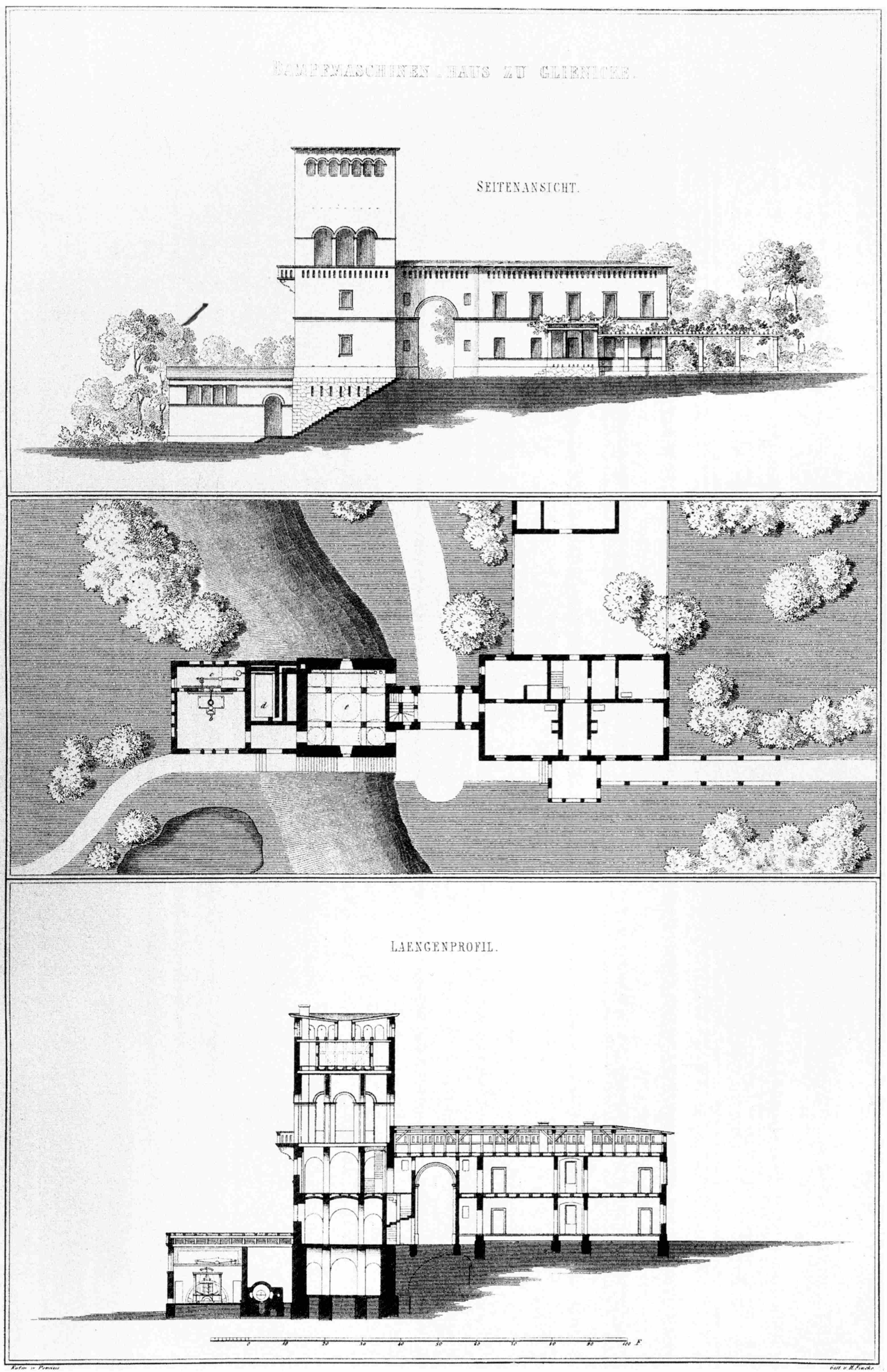 Berlin, Schloss Klein Glienicke Gärtner- und Maschinenenhaus Architekt: Ludwig Persius 1836/38